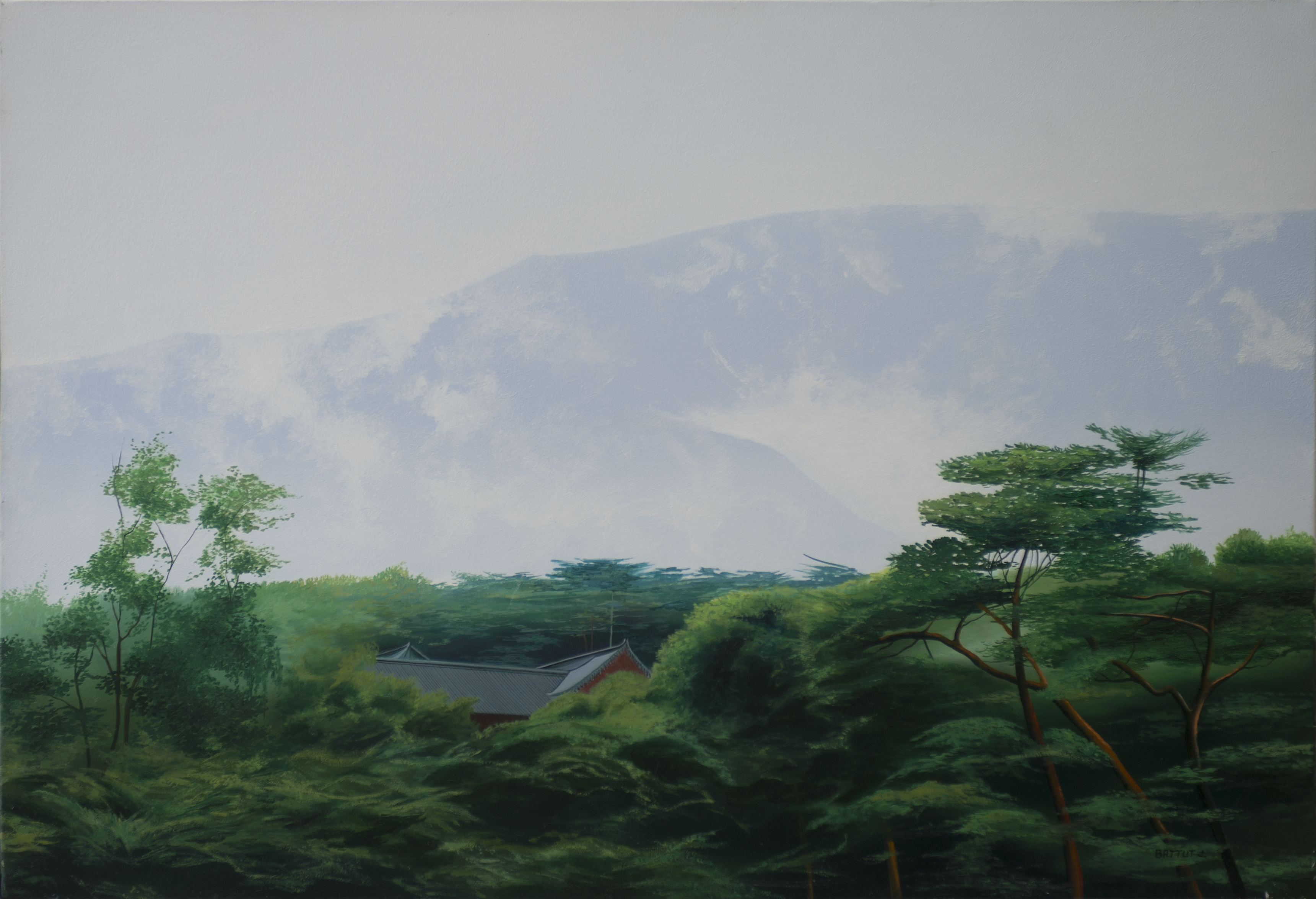 "Mystère végétal" 46x65 cm